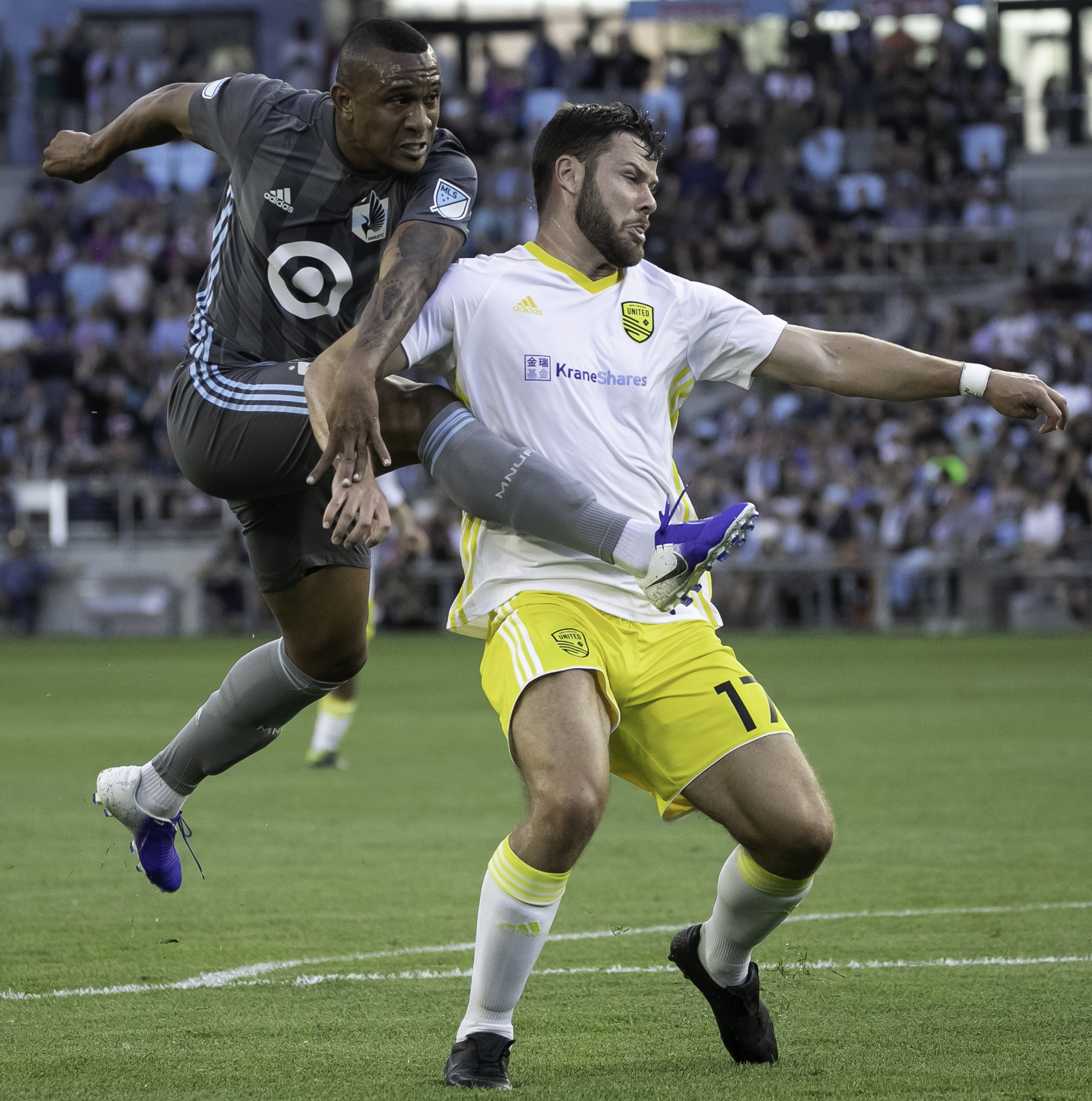 Angelo Rodriguez - MNUFC - Minnesota United Loons - Allianz Field - St. Paul Minnesota